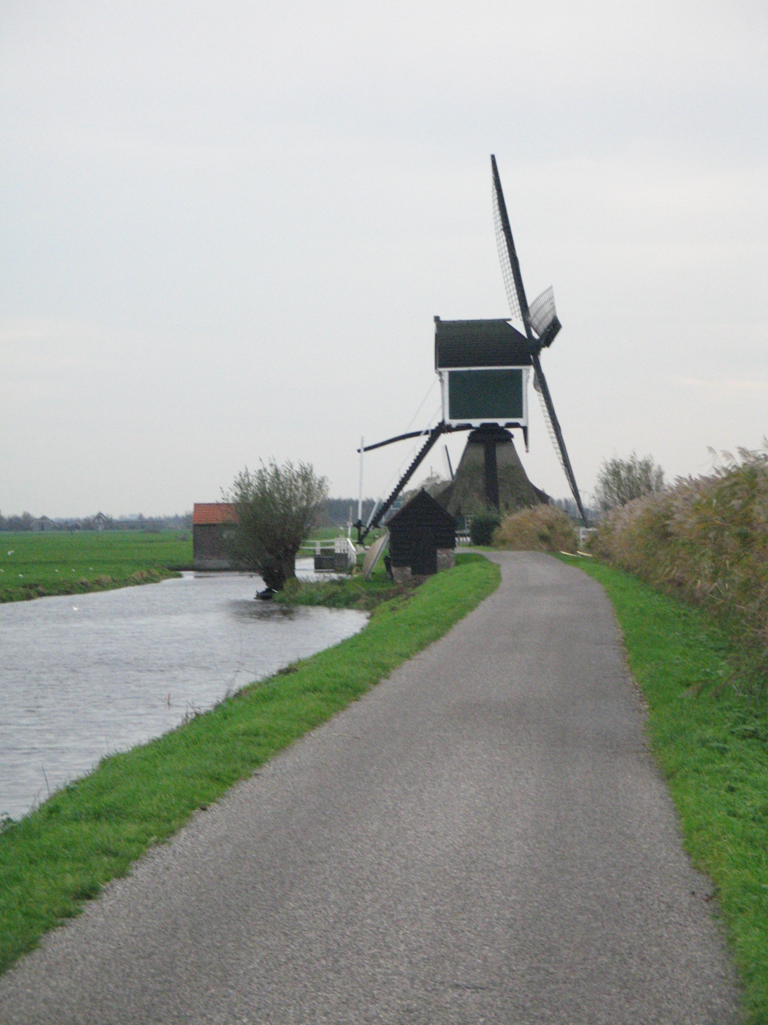 Deze foto heb ik zelf gemaakt voor een schoolproject en kan iedereen vrij gebruiken